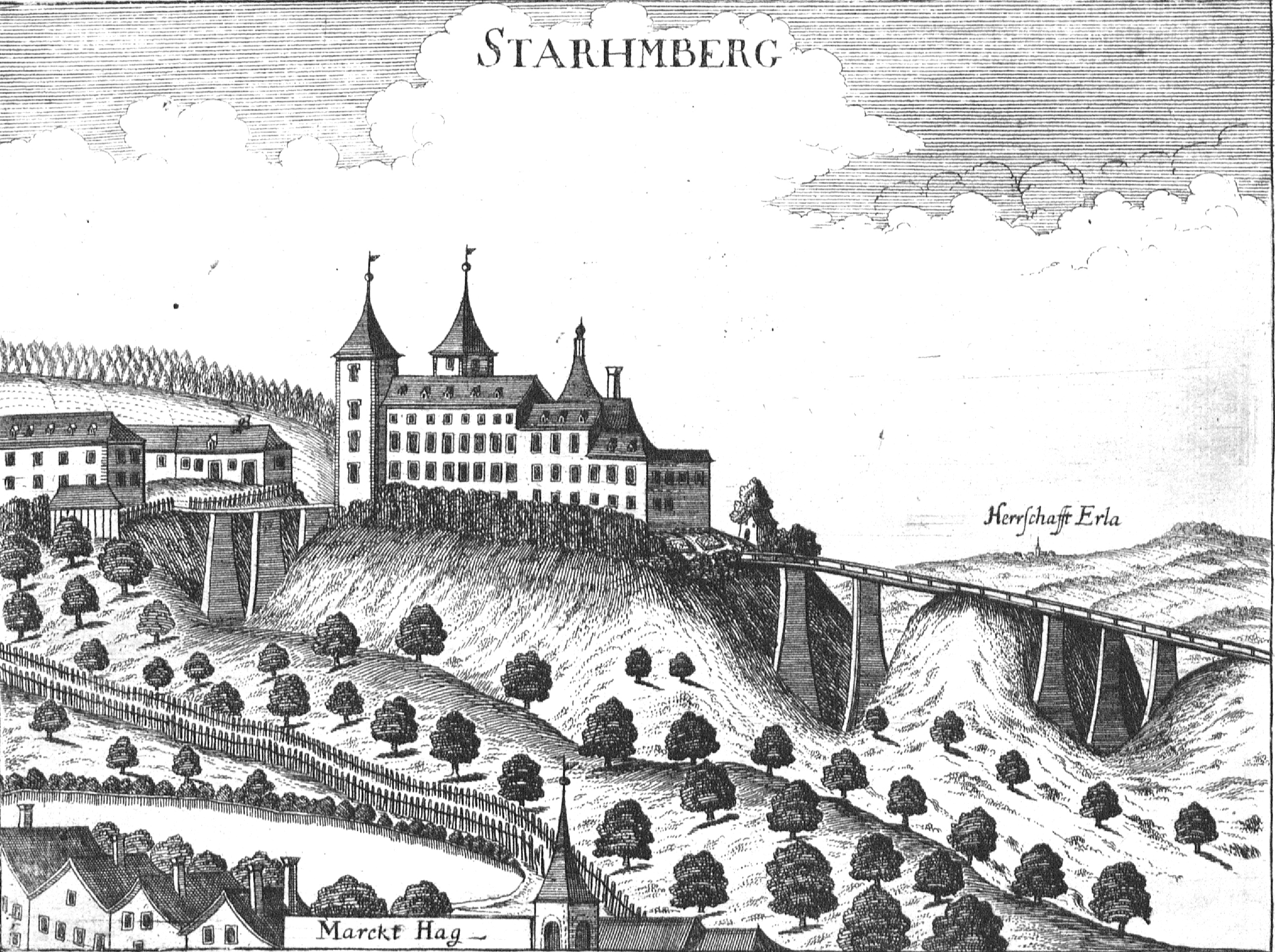 Schloss Starhemberg (Haag am Hausruck) nach einem Stich von Georg Matthäus Vischer von 1674 Topographia Austriae superioris modernae